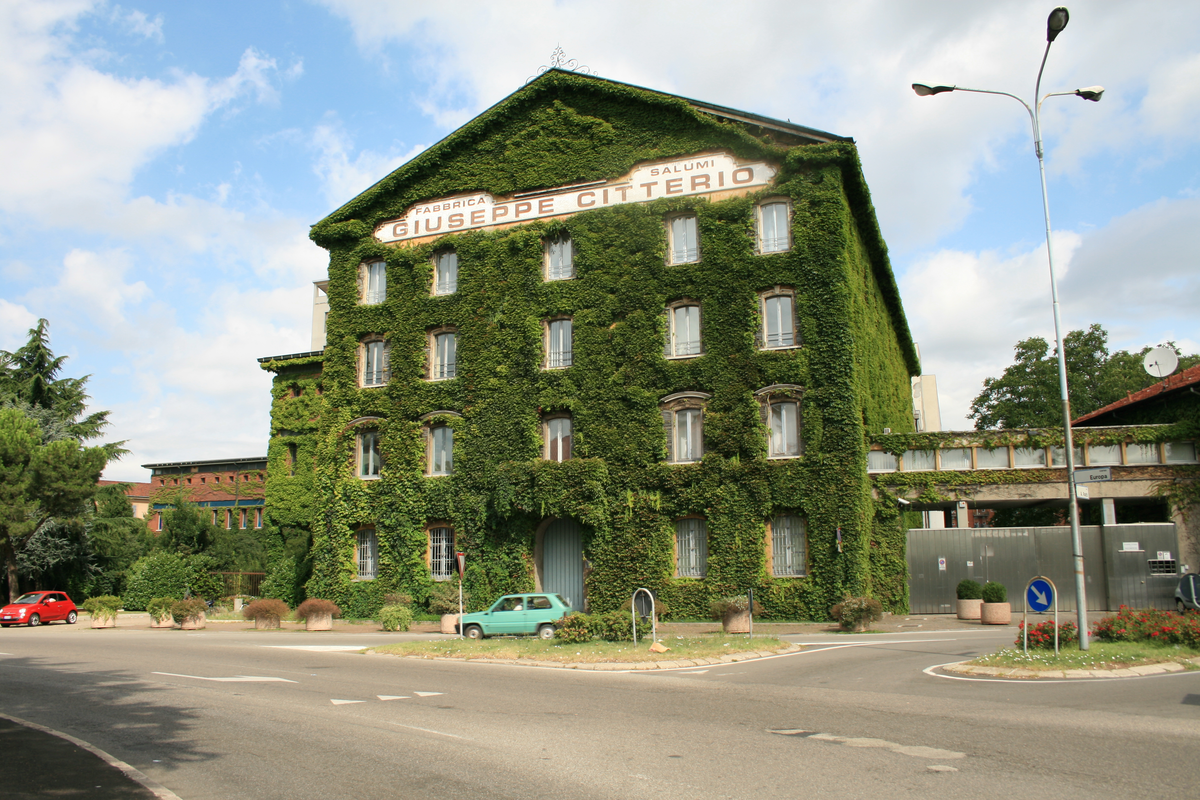 La sede storica del salumificio Giuseppe Citterio